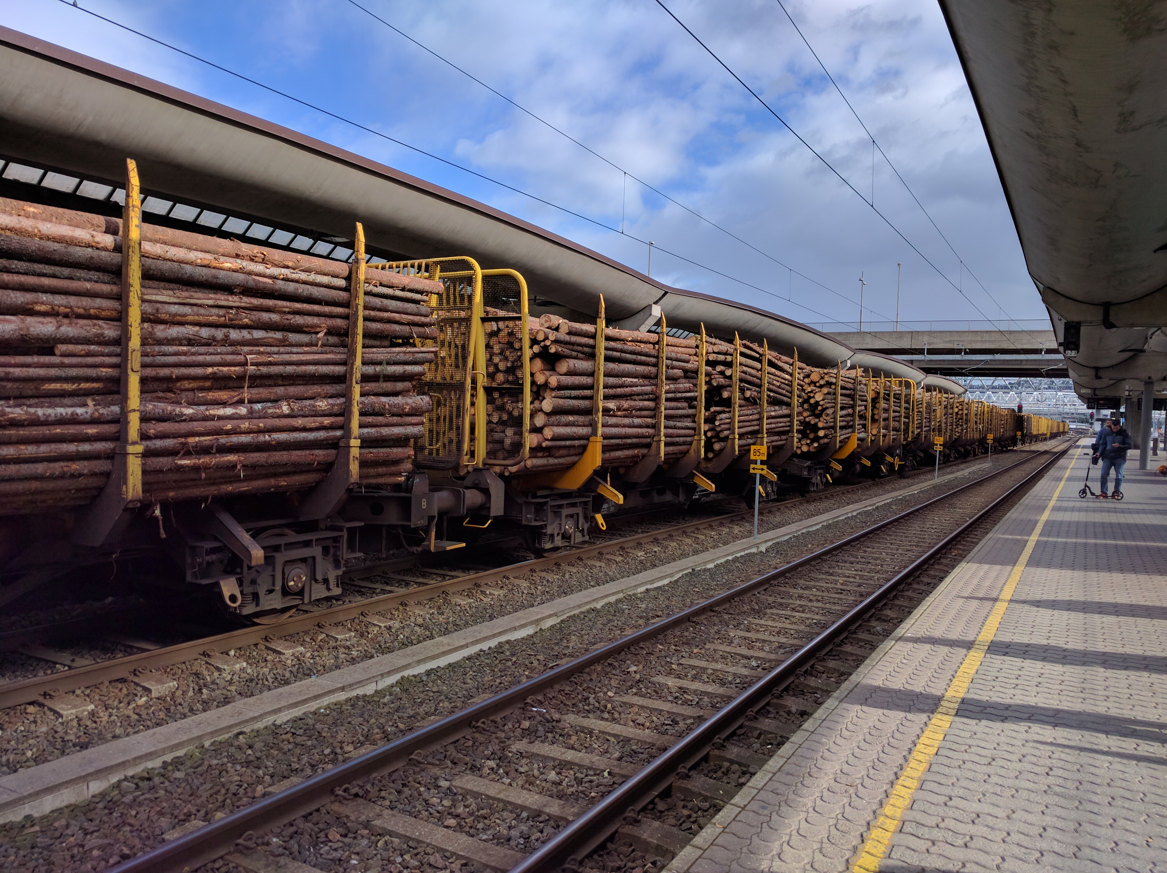 Tog som transporterer tømmer står og venter på klarsignal ved plattform 10 på Oslo sentralstasjon